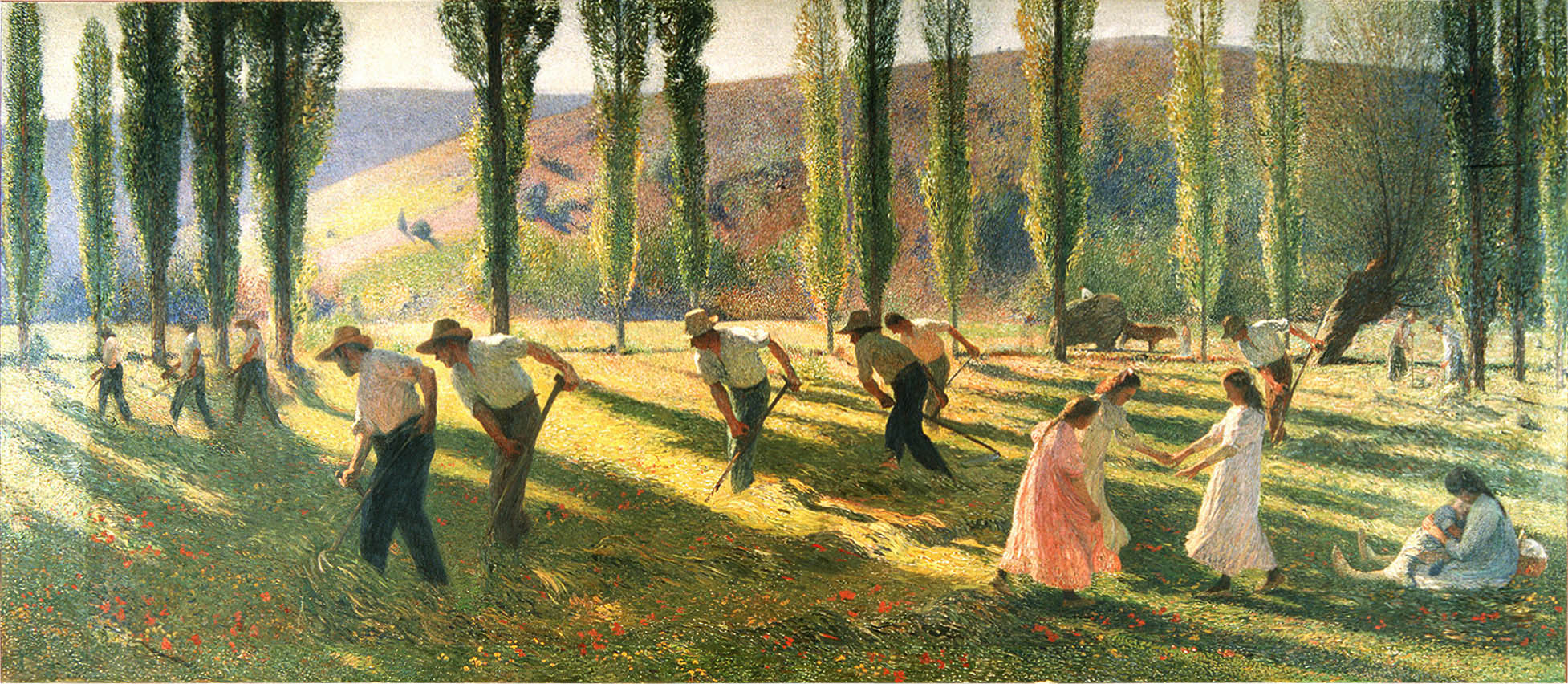 oil on panel